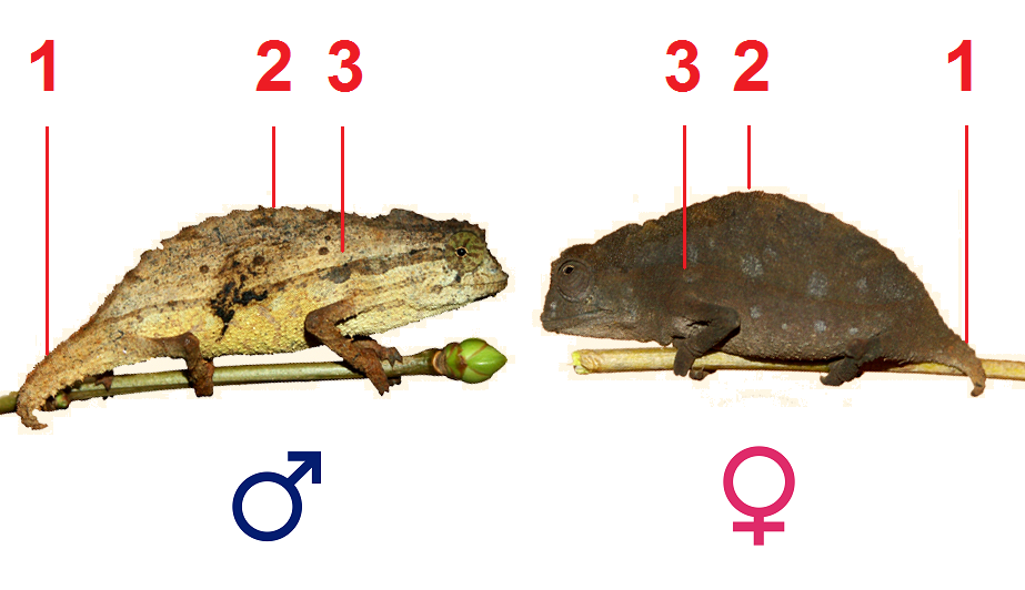 Grafik zum Sexualdimorphismus von Rieppeleon brevicaudatus